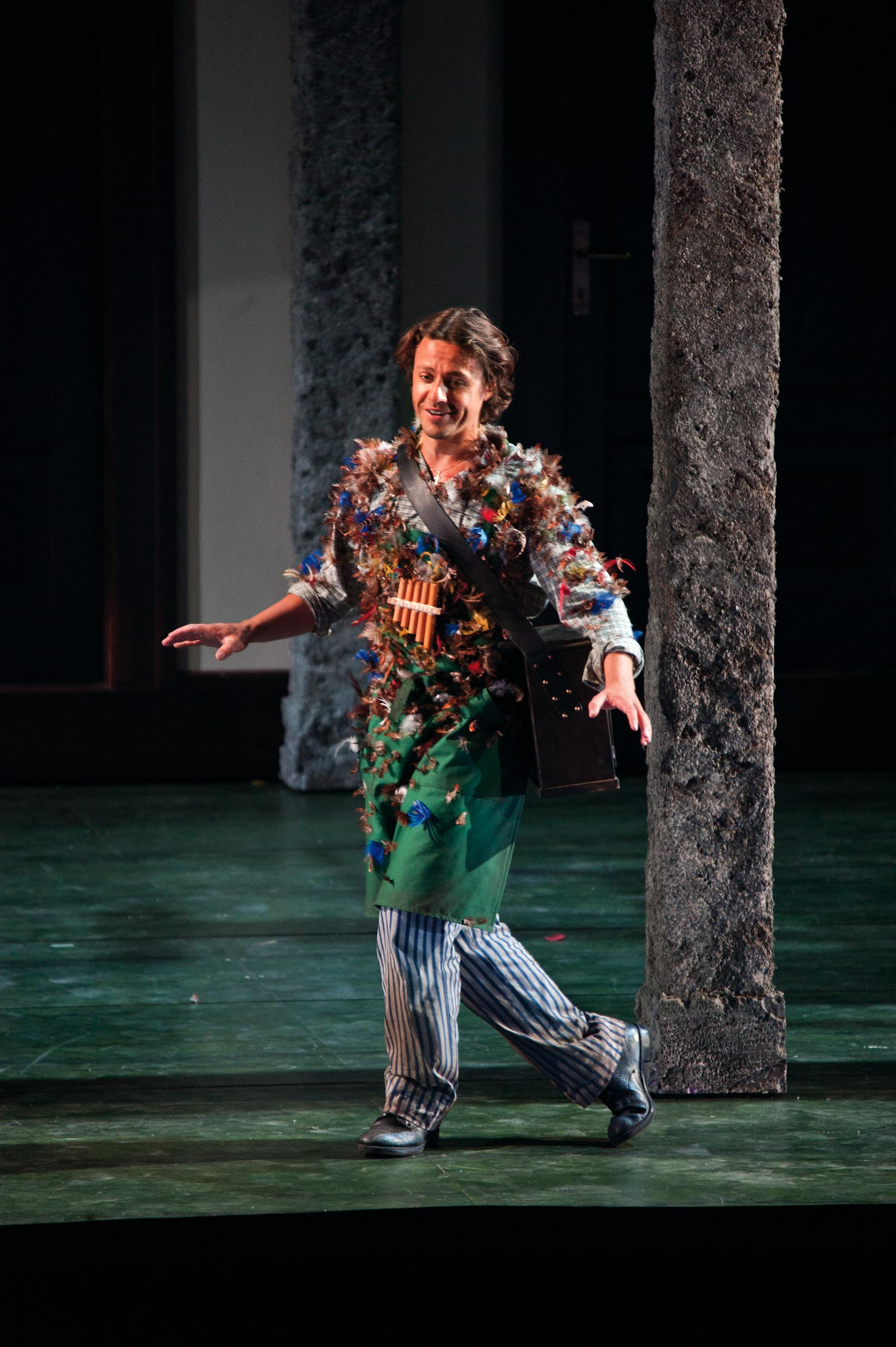 Salzburger Festspiele 2012 – Markus Werba als Papageno in Die Zauberflöte